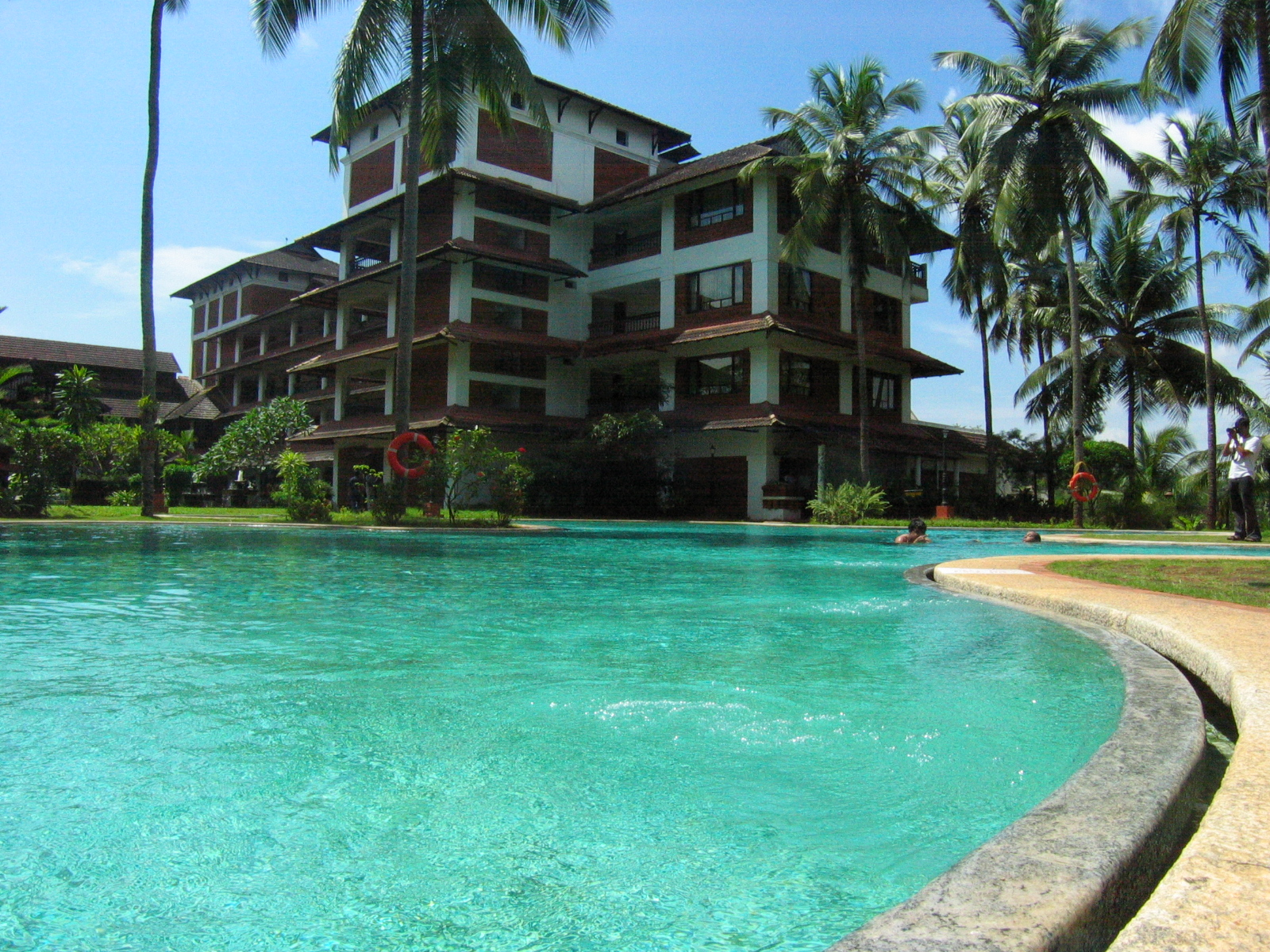 Kedavu resort, Calicut, Kerala